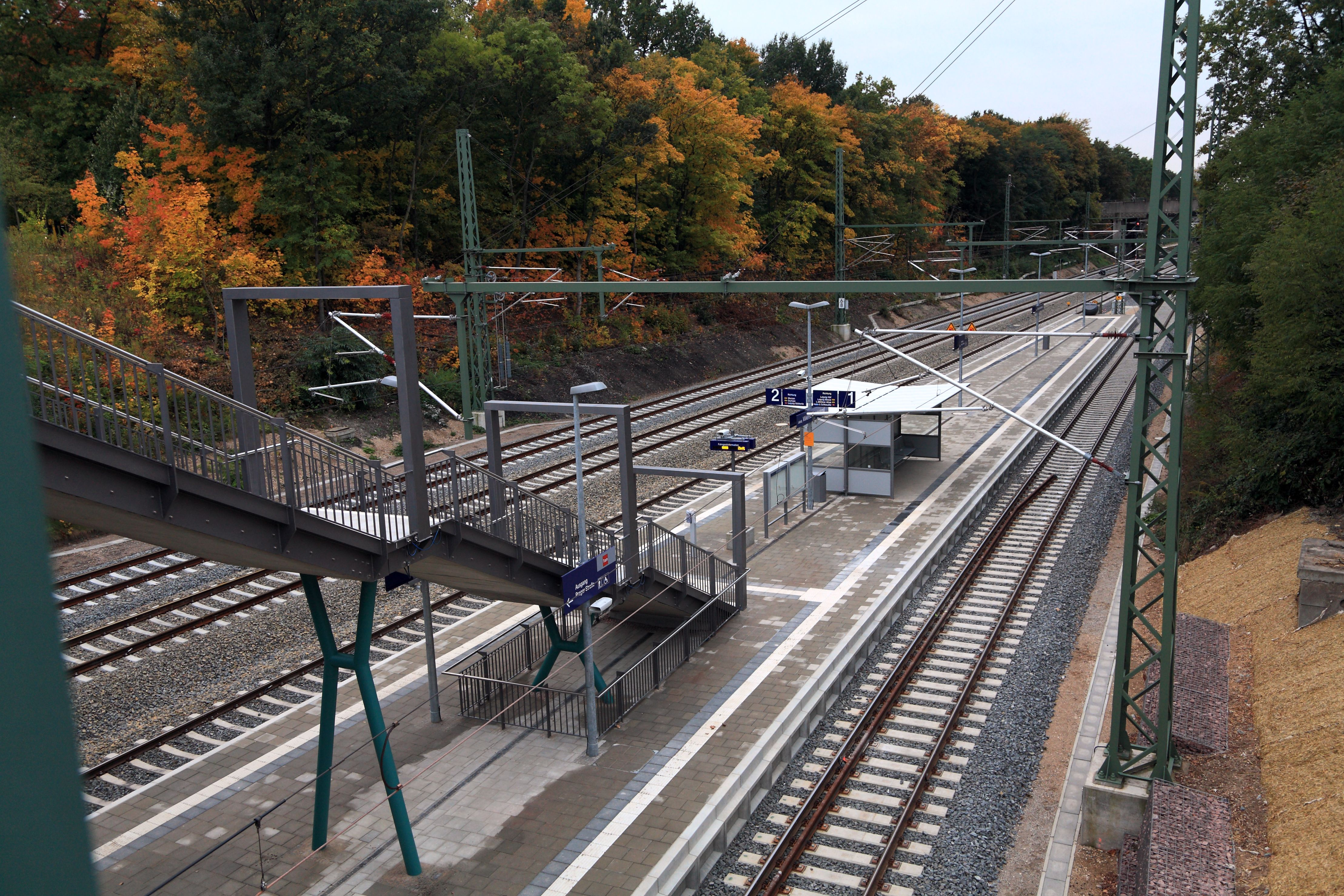 Die Streckenverhältnisse sind ein bisschen kompliziert. Die Gleise links sind die Strecke Leipzig Hbf–Connewitz (LC/6361), die beiden rechts die Strecke 6345/ELSt Engelsdorf–Connewitz, die seit dem Umbau am Streckenwechsel (bis zum Ausbau der Weichen Abzw) Tabakmühle in die Strecke LCV/6376 (Le Bayer Bf–Abzw Tabakmühle) übergeht. Der Bahnsteig ist ein S-Bahn-würdiger Inselbahnsteig, warum aber auf die eine Straßenseite nur eine Treppe und auf die andere nur ein Aufzug führen, wissen wohl nur die Planer. Platzmangel herrscht jedenfalls nicht. Ein wesentlicher Unterschied zu anderen S-Bahn-Netzen in vergleichbar feuchtem Klima ist der Wetterschutz, der bei der MDSB vollkommen unter den Tisch gefallen ist.Von der Brücke Prager Straße